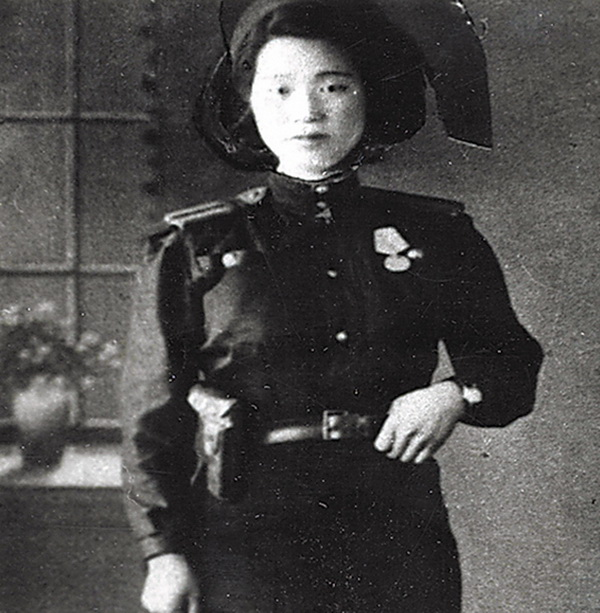 解放东北时的李敏。